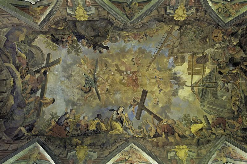 Kreuzlegende, Deckengemälde der Schlosskirche Rastatt, Johann Hiebel, 1722